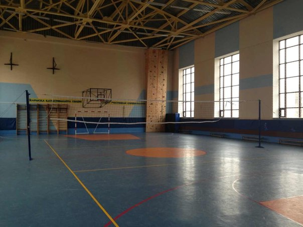 Спортзал